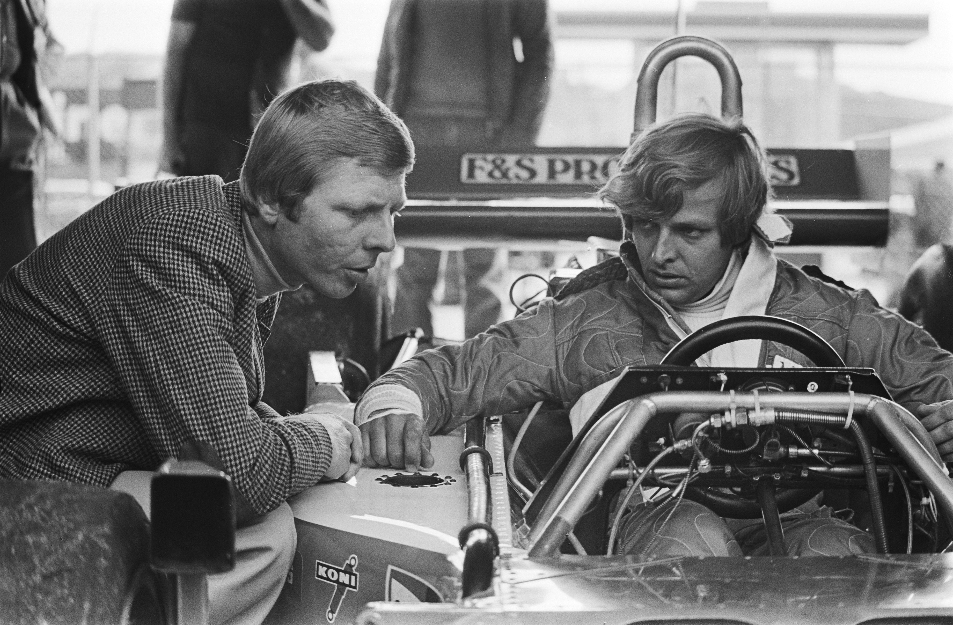 Collectie / Archief : Fotocollectie Anefo Reportage / Serie : [ onbekend ] Beschrijving : Kwalificatieritten voor training Grand Prix van Nederland Michel Bleekemolen krijgt advies van Gijs van Lennep Datum : 23 augustus 1977 Trefwoorden : auto's Persoonsnaam : Bleekemolen, Michel, Gijs van Lennep Fotograaf : Suyk, Koen / Anefo Auteursrechthebbende : Nationaal Archief Materiaalsoort : Negatief (zwart/wit) Nummer archiefinventaris : bekijk toegang 2.24.01.05 Bestanddeelnummer : 929-3168